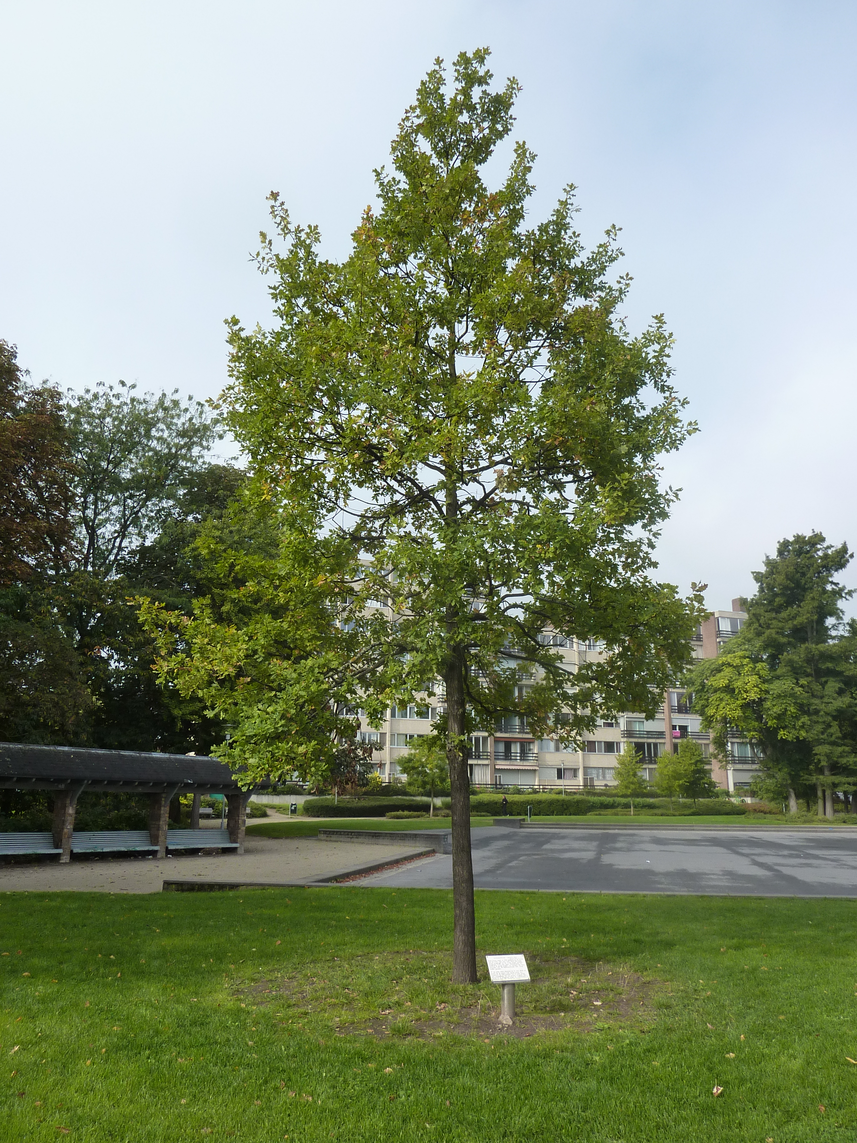 Jarmila arbo ("Esperanto-arbo"), Parko Den Bruul, Loveno, Belgio